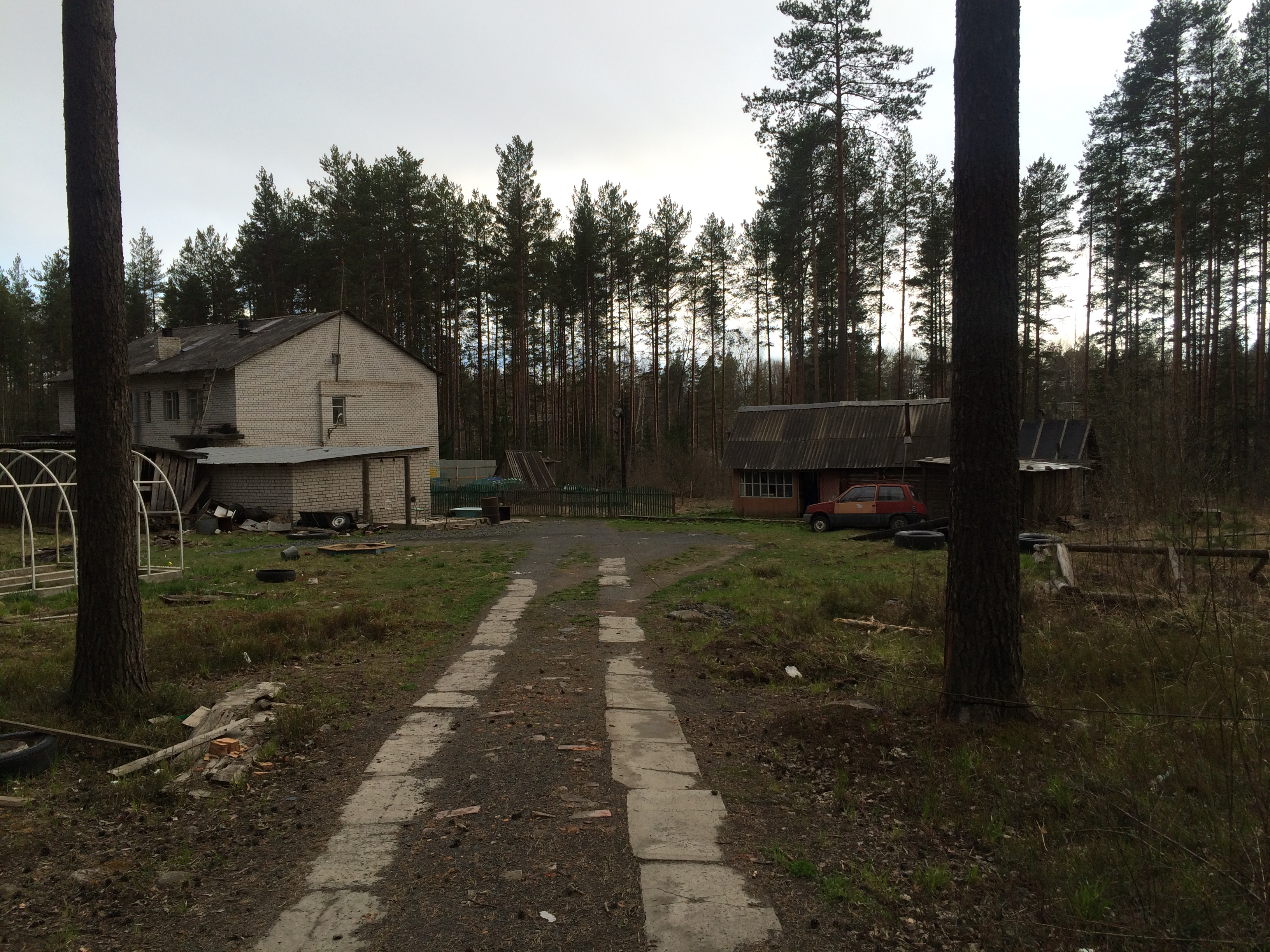 пст Заделье